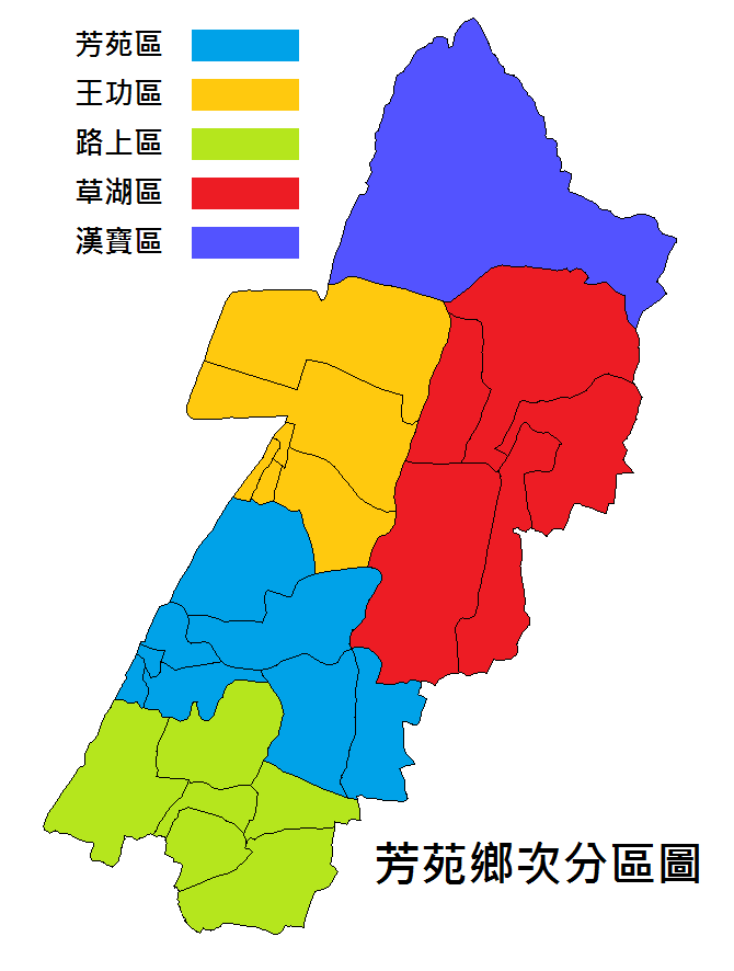 中文（台灣）: 彰化縣芳苑鄉次分區圖。